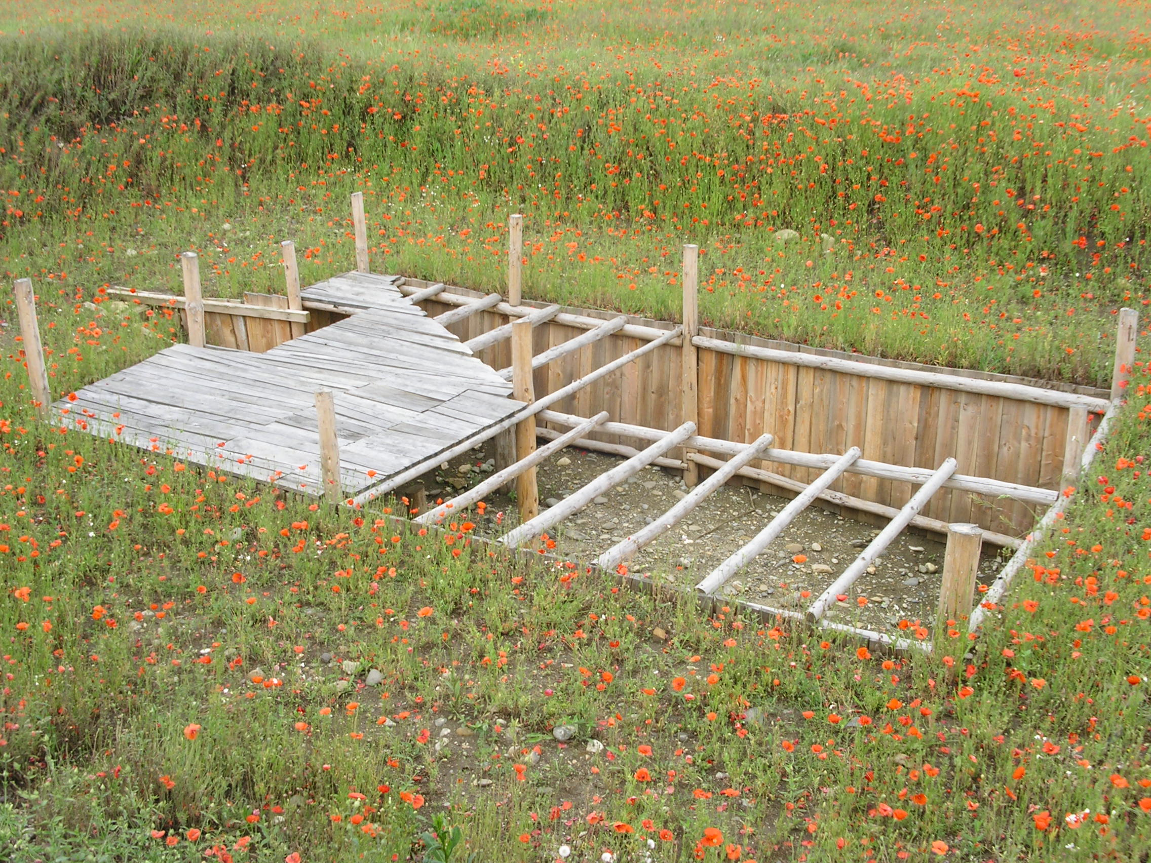 Fouilles à Gondole (Le Cendre, 63)